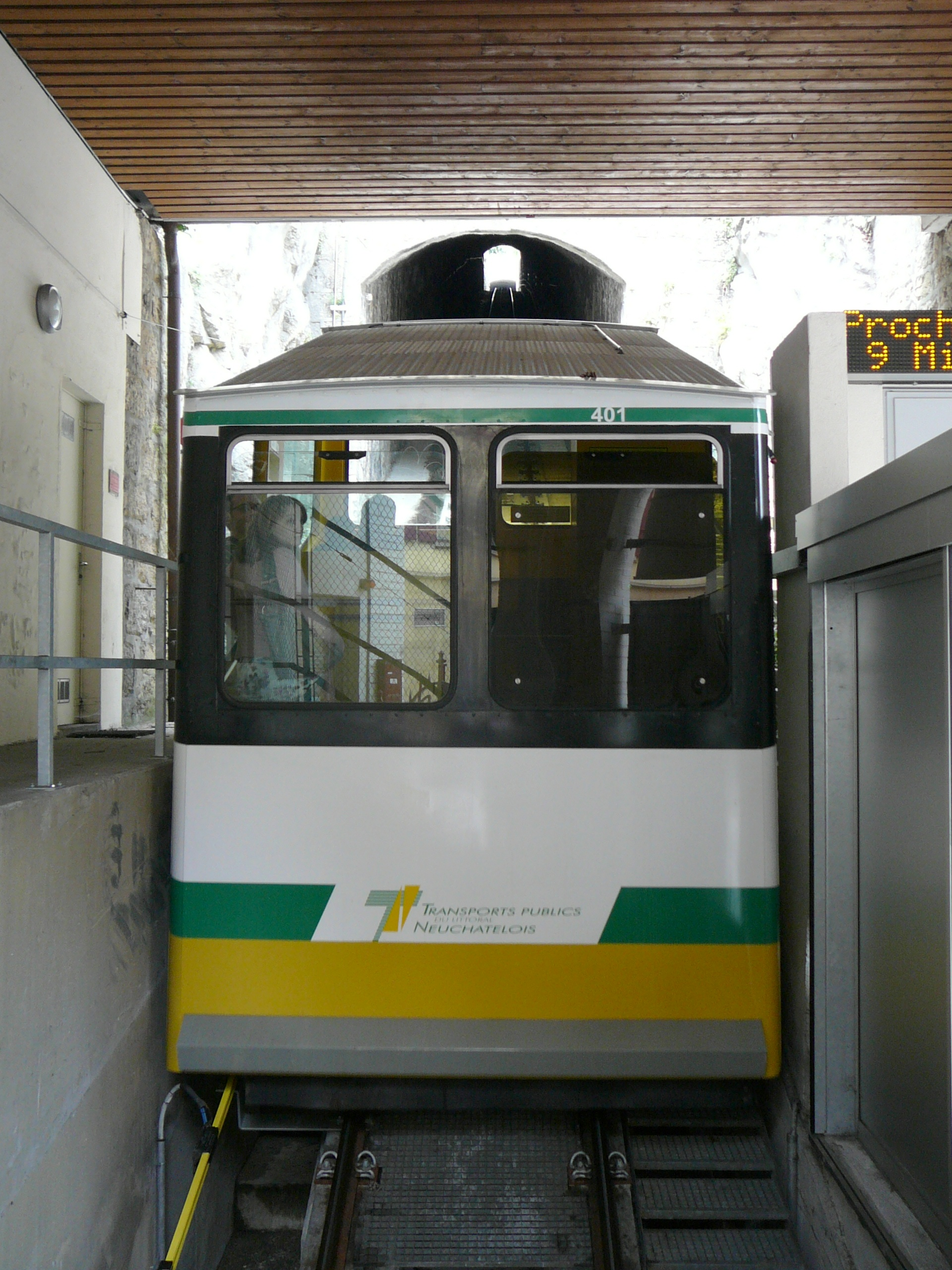 Funiculaire Ecluse-Plan au départ de la station Ecluse